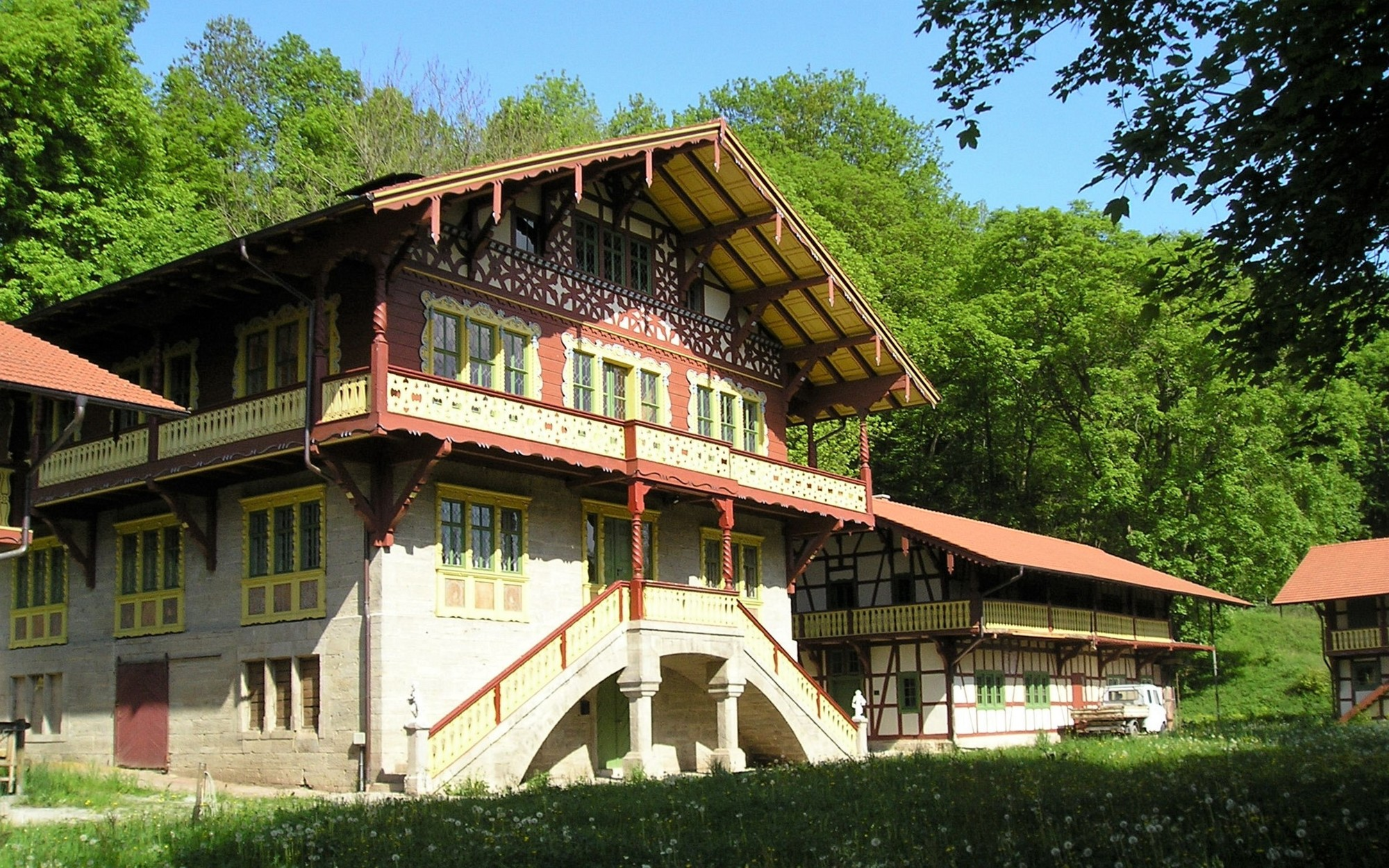 Gutshof Meierei in Meiningen, Herrenhaus (links) und Stallgebäude.